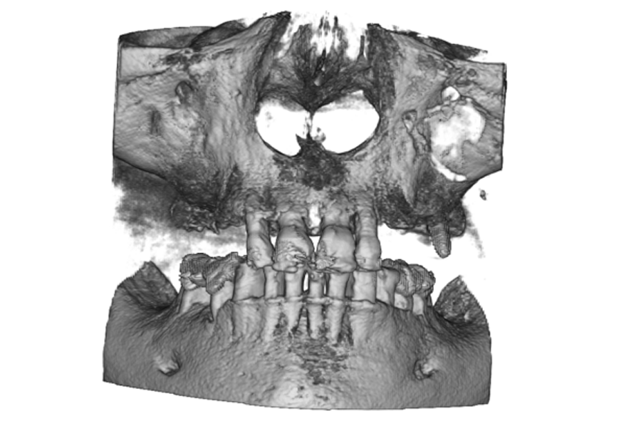 Ansicht einer digitalen Volumentomografie des Ober- und Unterkiefers. Das hier dargestellte Volumen hat einer Field-of-View Größe von 8 x 8 cm.